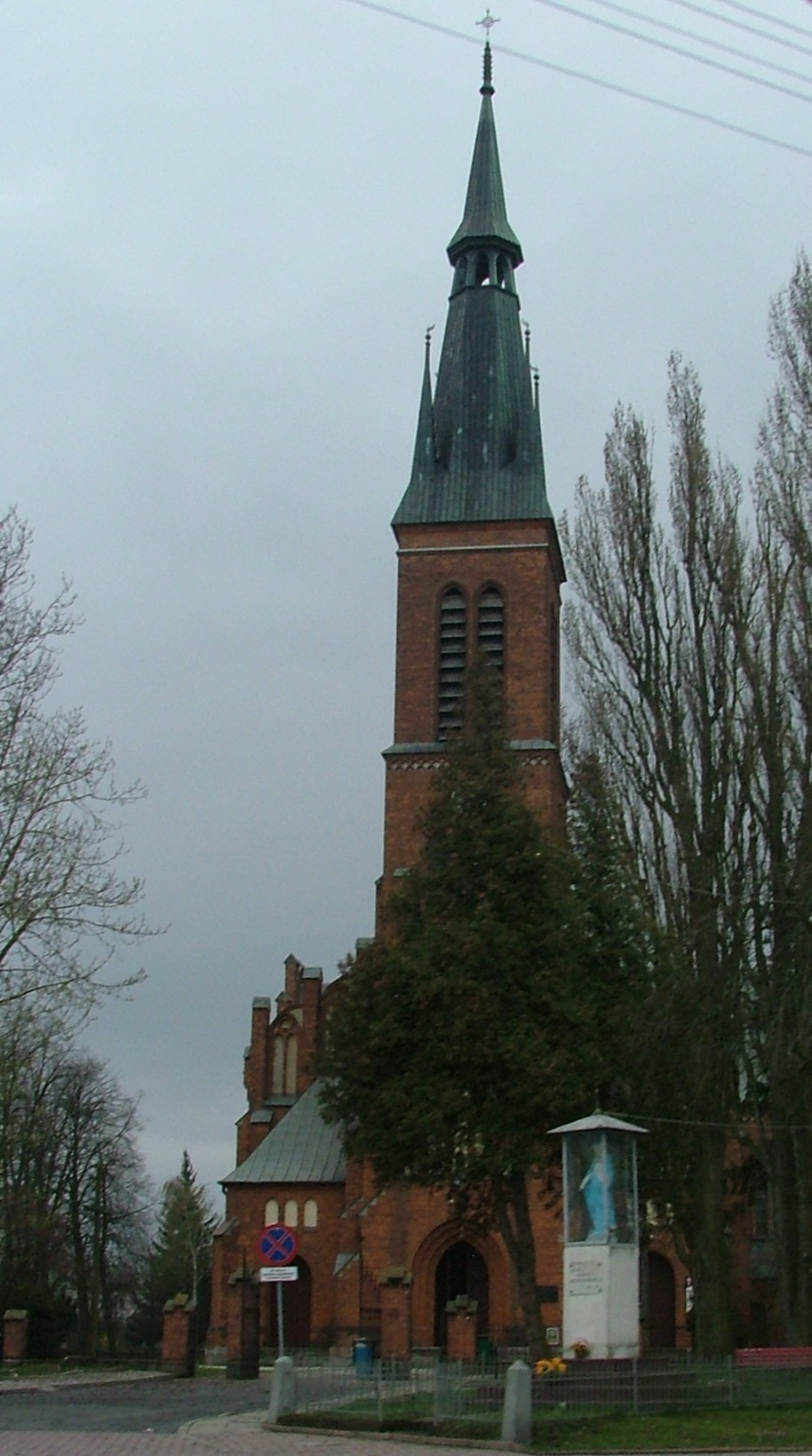 Ryki, woj. lubelskie, powiat rycki, kościół p.w. Najświętszego Zbawiciela